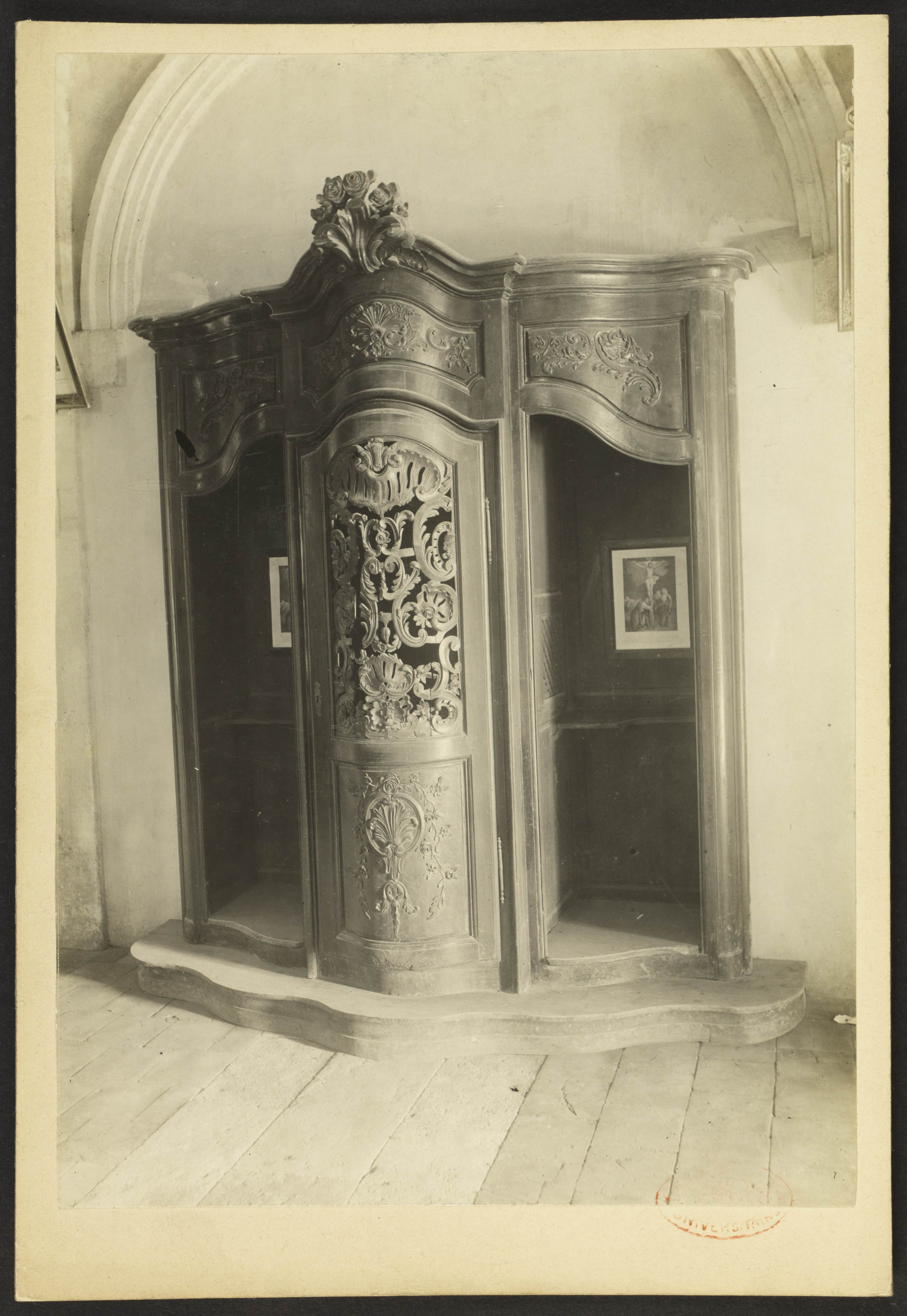 Église Saint Romain de Saint-Romain-la-Virvée; Mauvaise orthographe de l'exemplaire papier: "saint-roman la vervée"